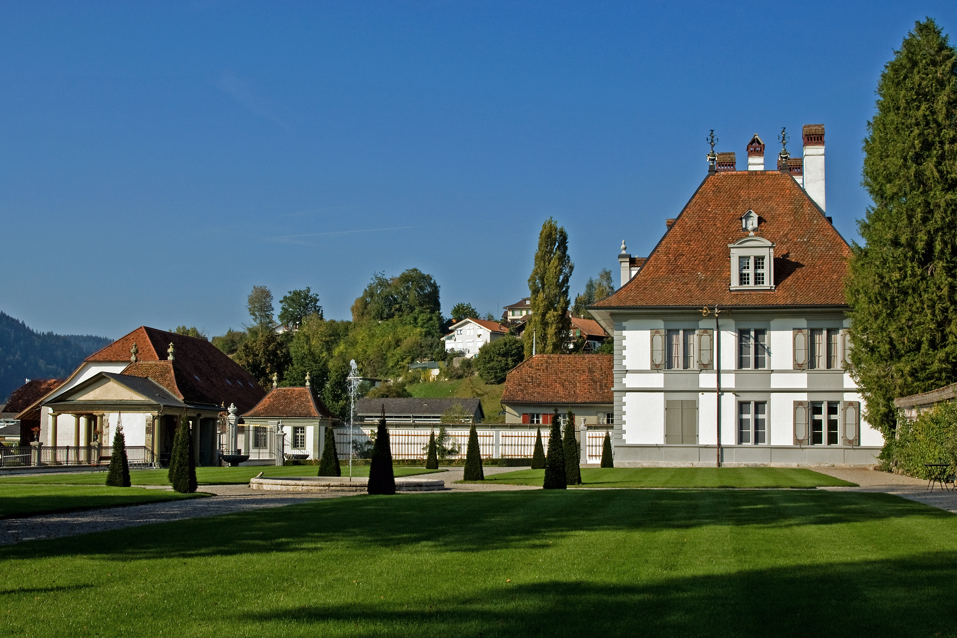 Oberdiessbach BE, Neues Schloss von der West-Seite, vom Park her